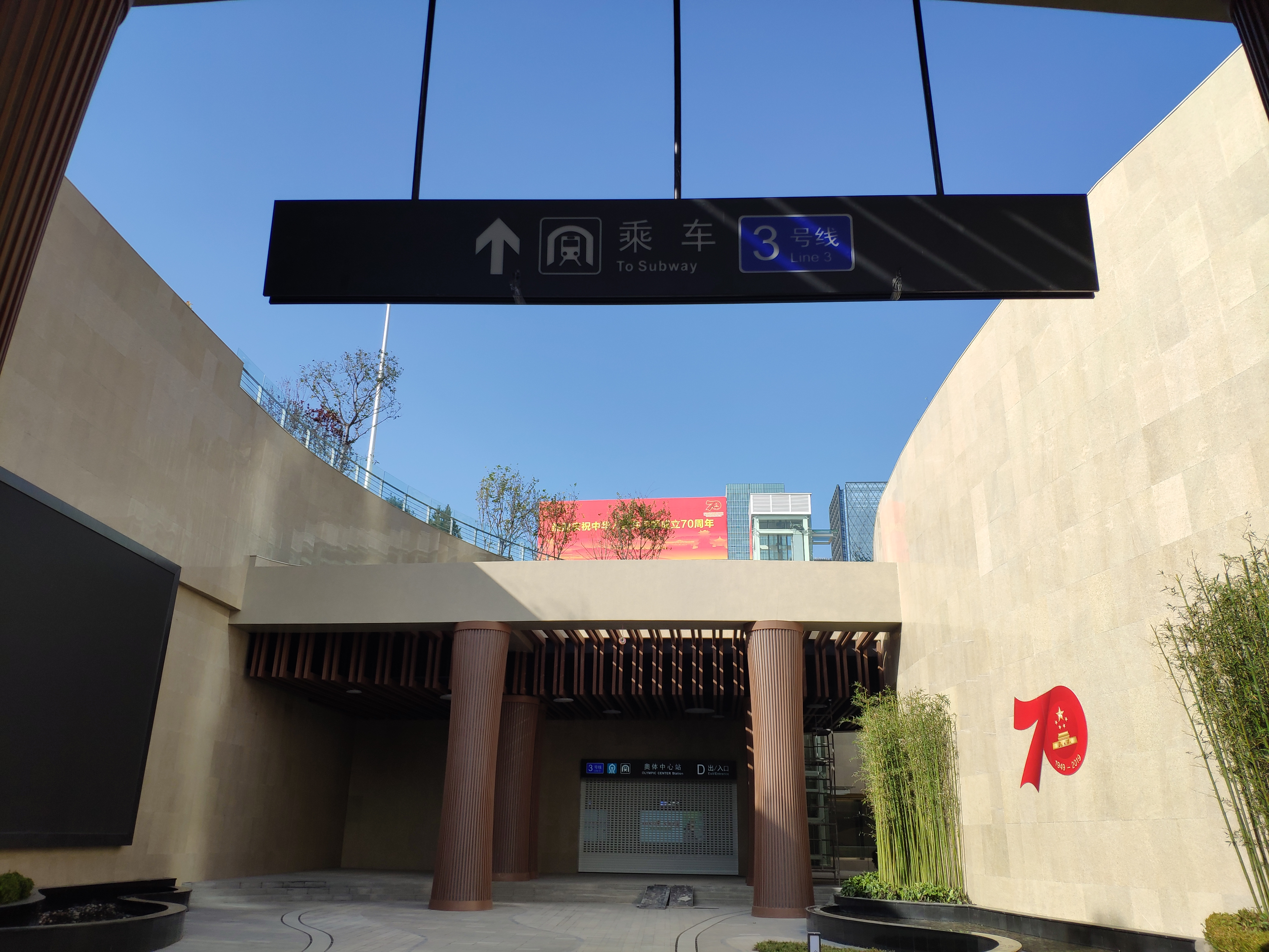 济南地铁3号线，奥体中心站D出口（尚未开放）